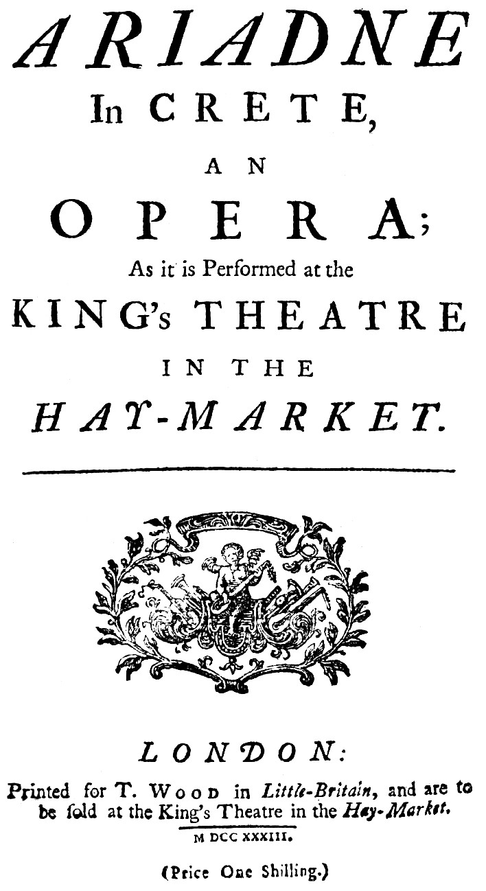 Titelblatt des Textbuches zu Arianna in Creta, London 1734